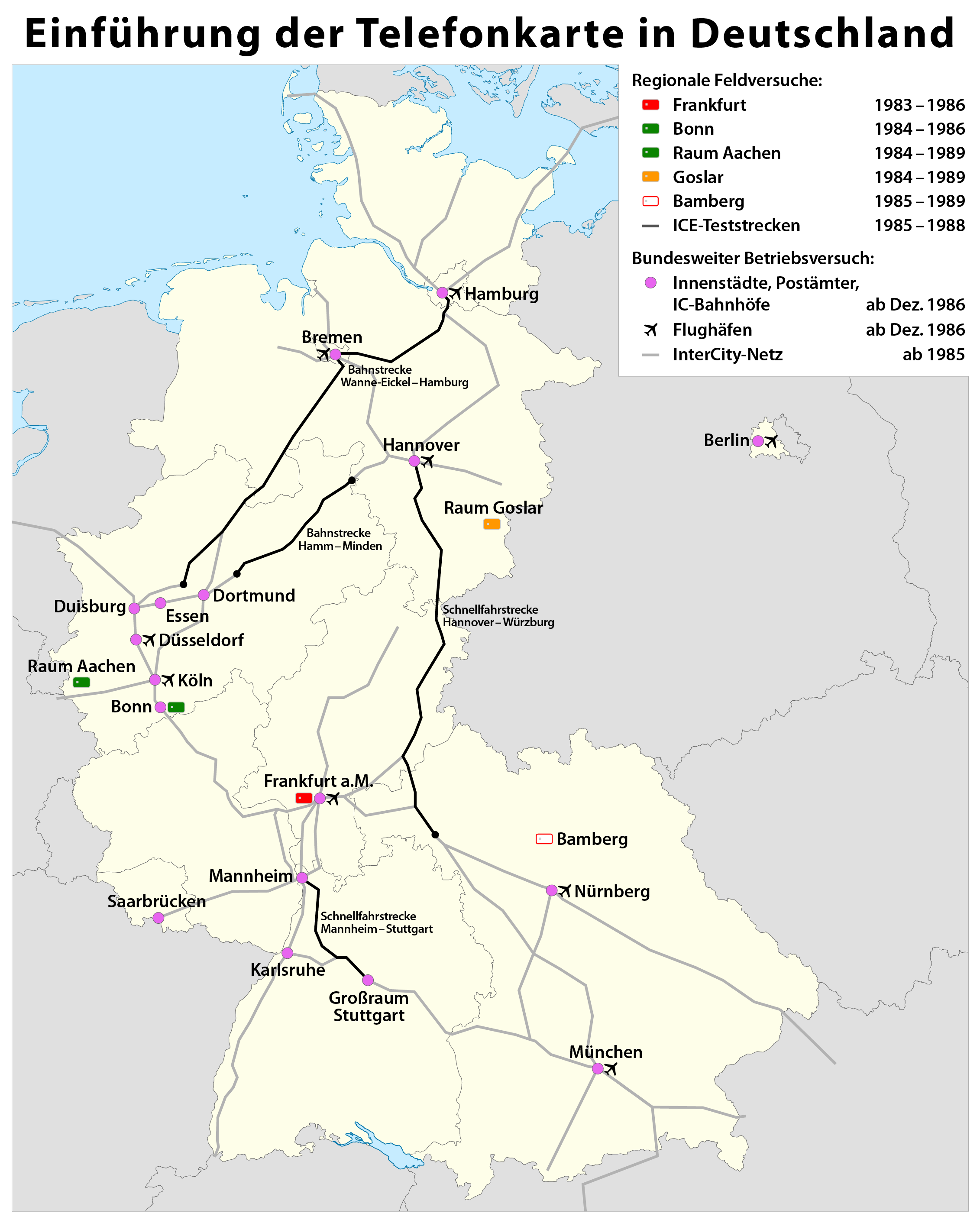 Karte: Die Einführung der Telefonkarte in Deutschland